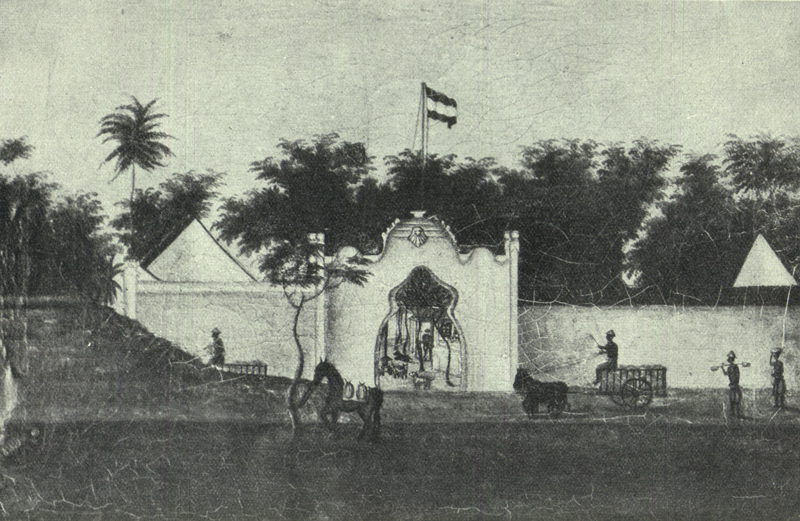 Mads Johansen Langes factotori i Koeta. Langes berømte dalmatinerhunde vogter indgangen.